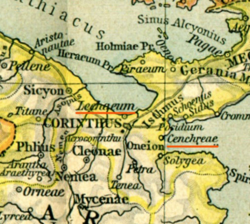 Lageplan von Kenchreai und Lechaion (Putzger 1925)